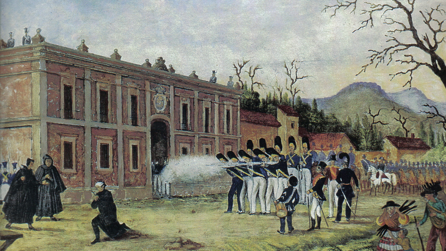 Flag Of Morelos